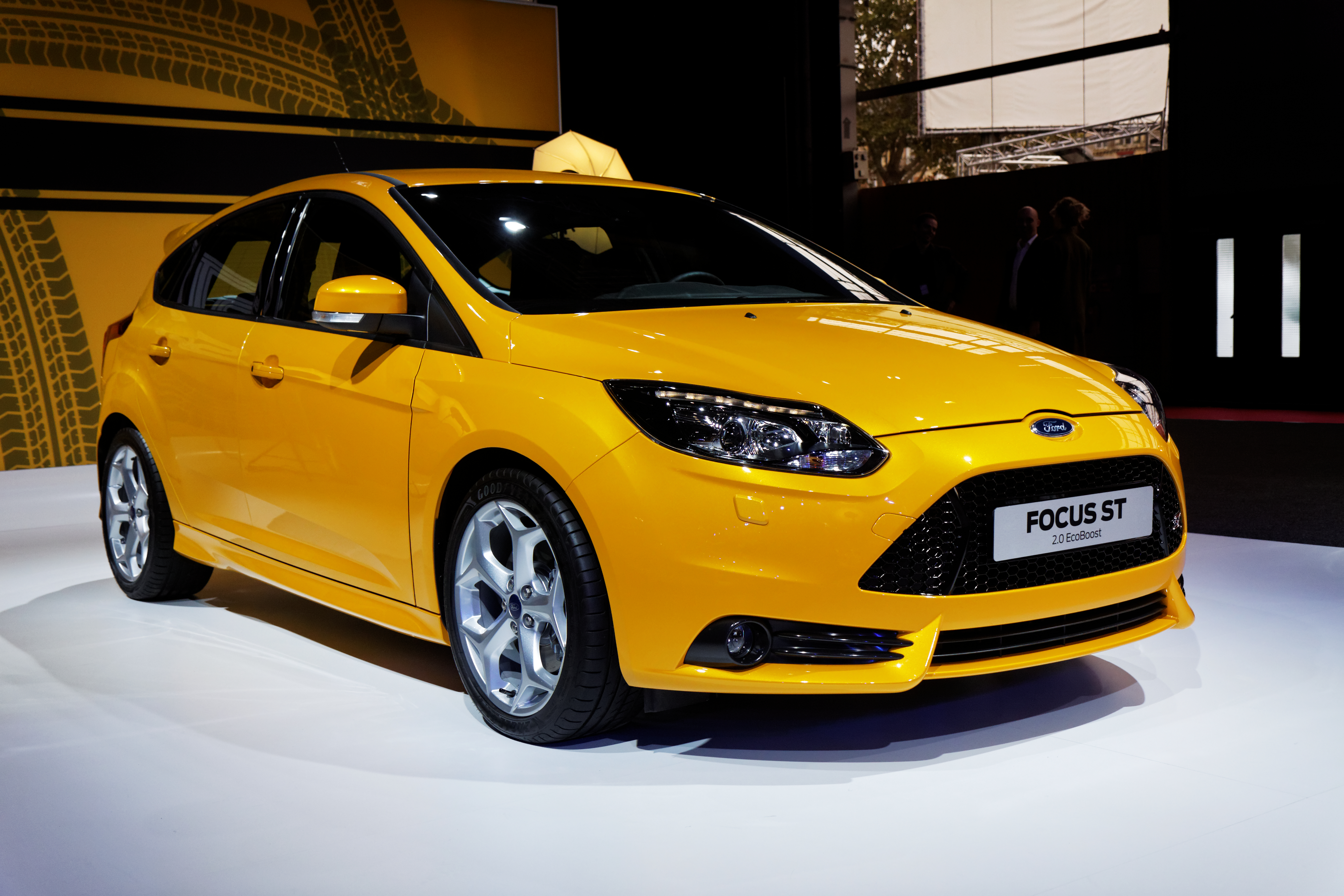 Une Ford Focus présentée lors du Mondial de l'Automobile de Paris 2012.